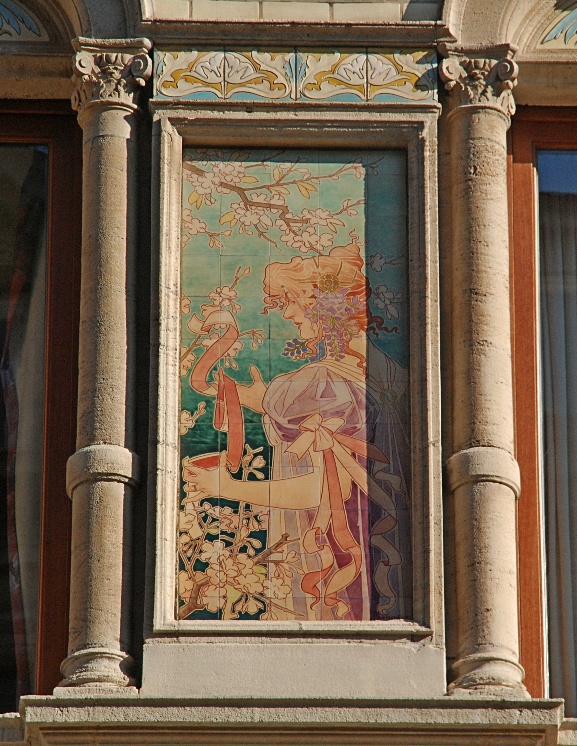 Grande Maison de Blanc, rue du Marché aux Poulets, 32-34 à Bruxelles (Belgique), céramiques de Privat Livemont